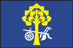 prapor obce Huštenovice